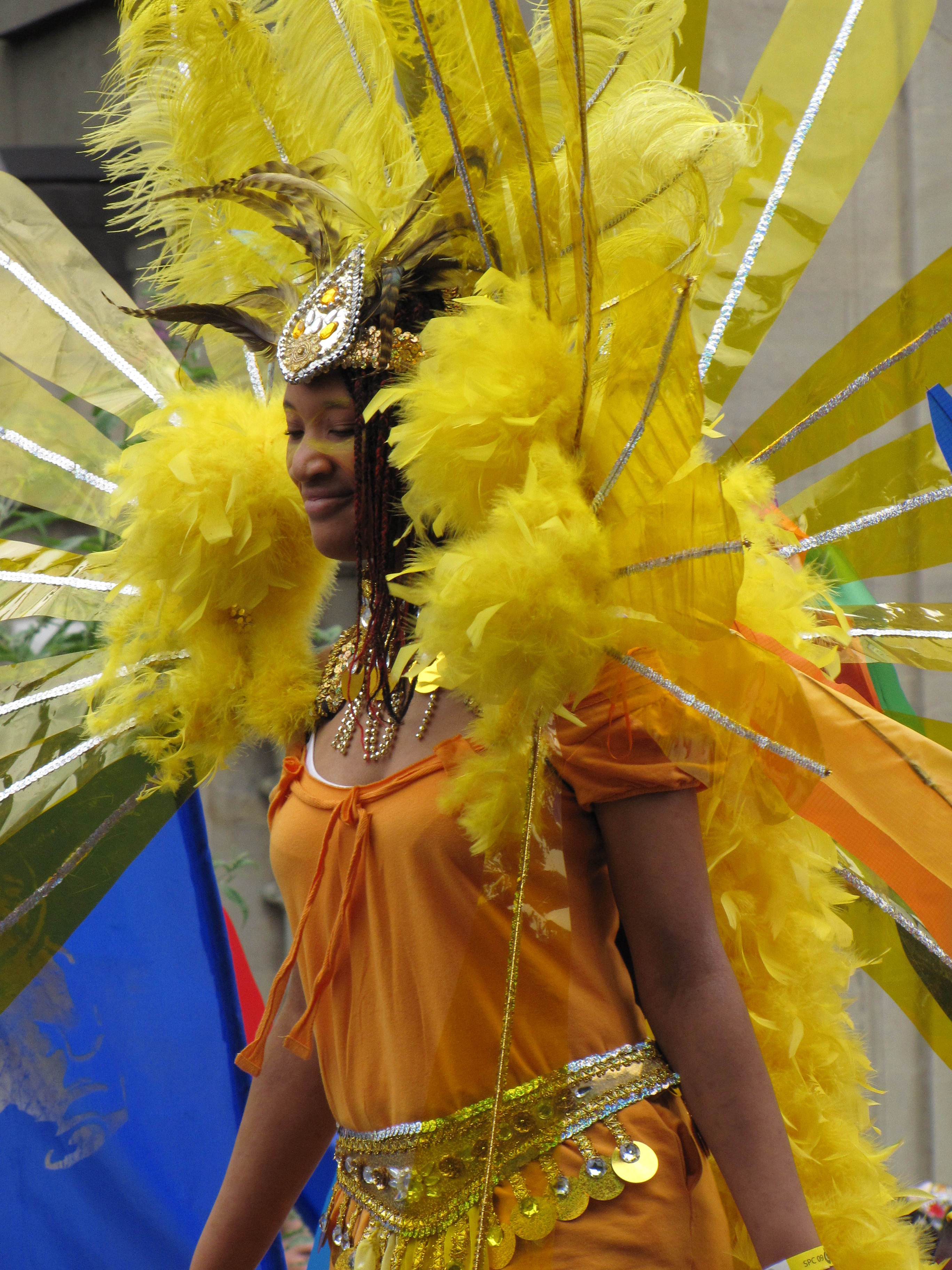 Entrant in Mas parade, St Pauls Carnival, 2009